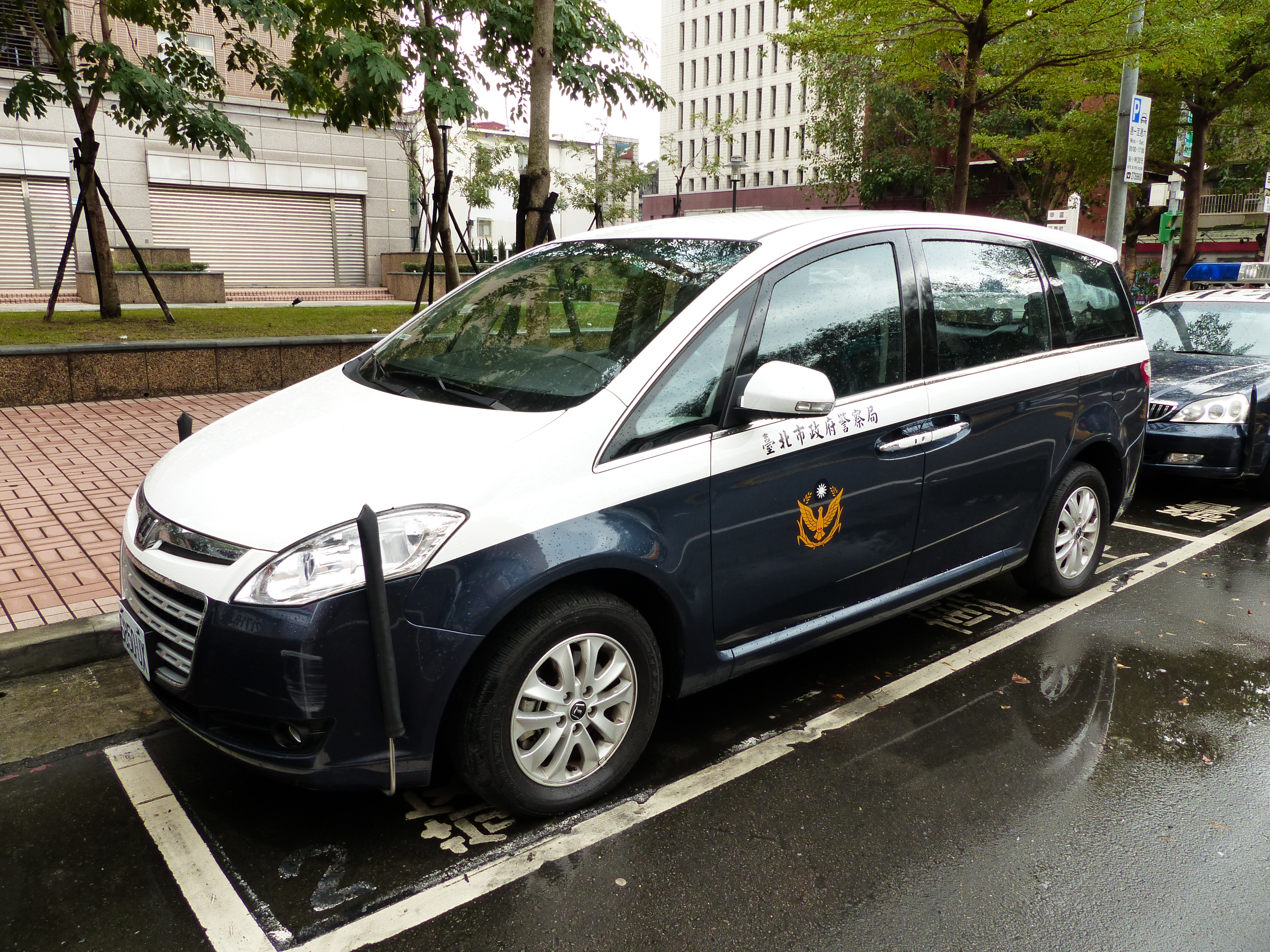 臺北市松山區延壽街330巷路旁的臺北市政府警察局納智捷7 MPV警備車左前方，遠方高樓是臺北市政府警察局保安警察大隊。